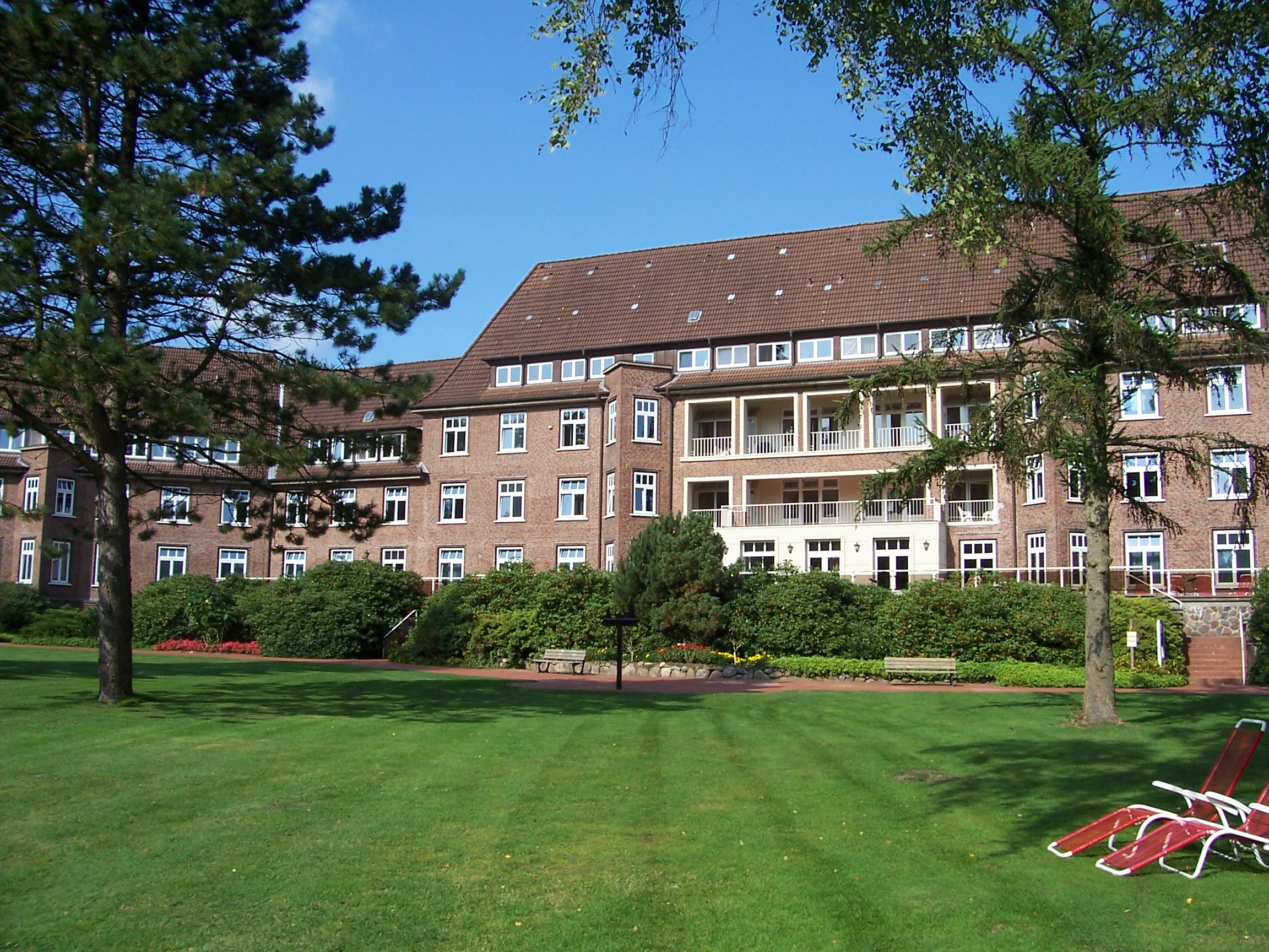 Altbau der Fachklink Aukrug